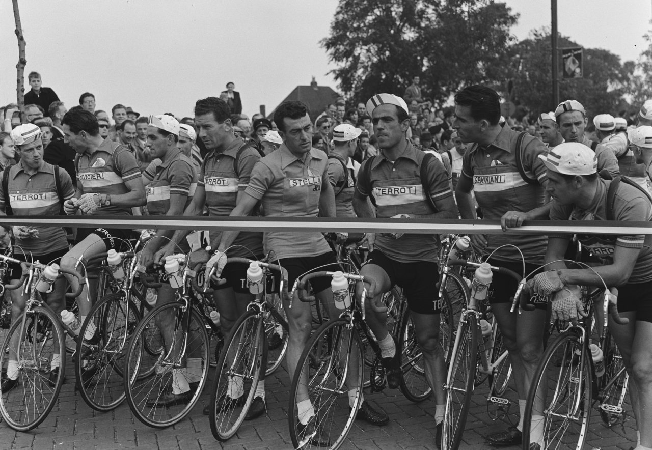 Tour de France , vertrek uit Amsterdam, start aan Haagseweg, de Franse ploeg aan de start.